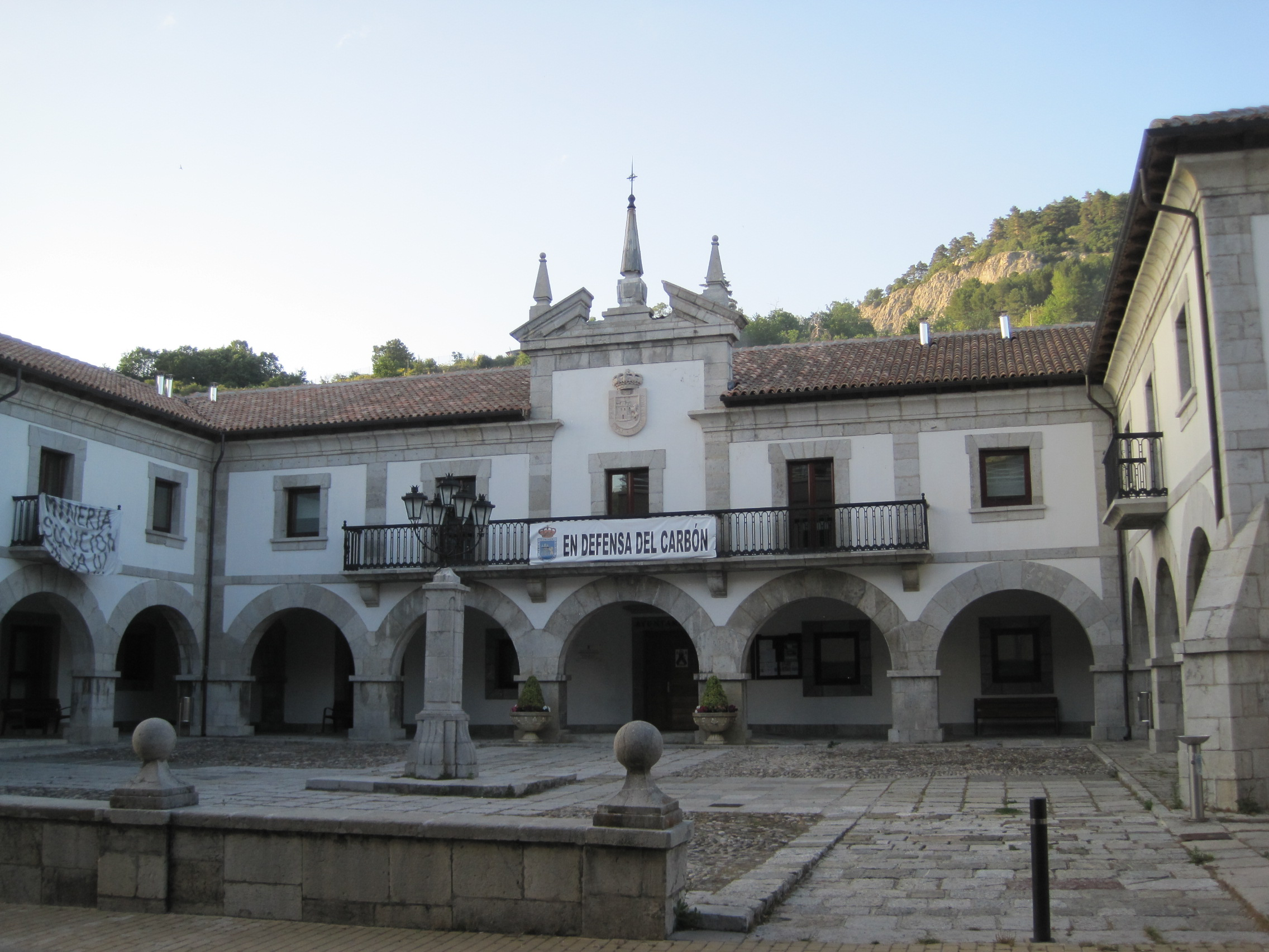 Ayuntamiento de La Pola de Gordón (León, España).